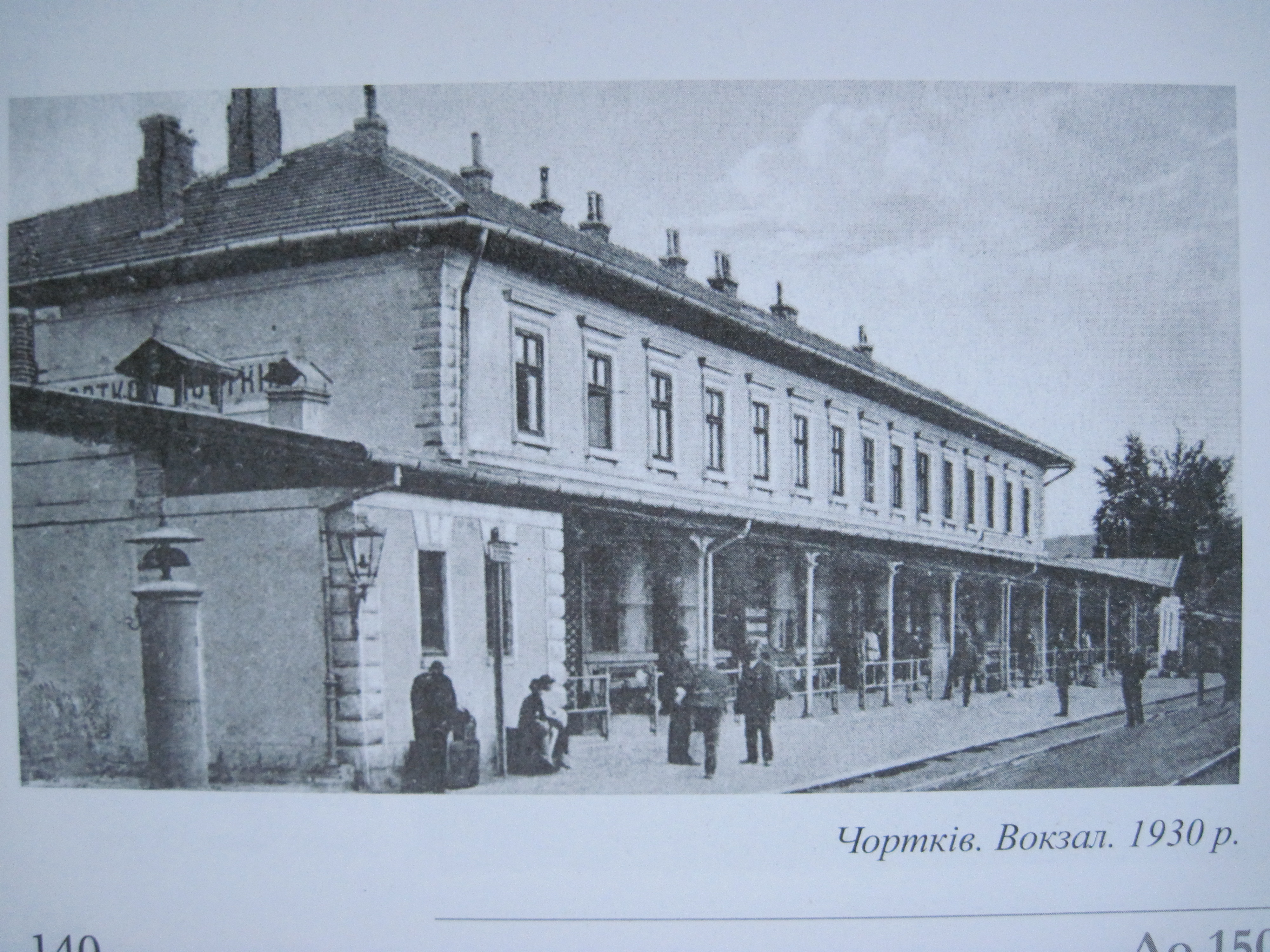 Старий залізничний вокзал. Чортків